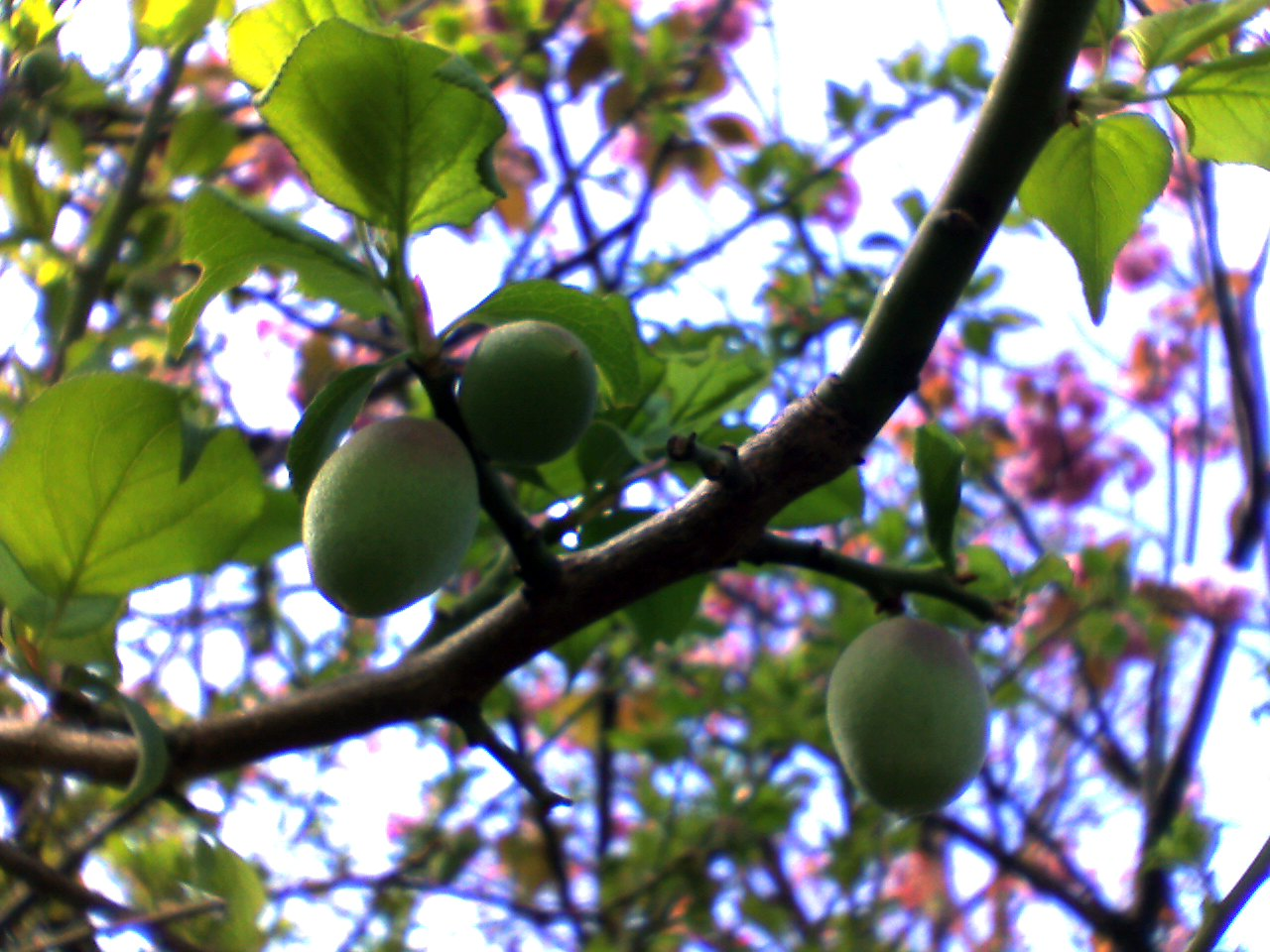 Japanese apricot(Fruit)